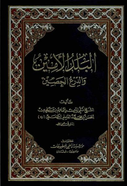 البلد الأمين كتاب: البلد الامين والدرع الحصين تأليف: الشيخ تقي الدين ابراهيم بن علي بن الحسن بن محمد العاملي الكفعمي قدم له وعلق عليه: علاء الدين الاعلمي الناشر: منشورات مؤسسة الاعلمي للمطبوعات الطبعة: الاولى 1997 عدد الصفحات: 735